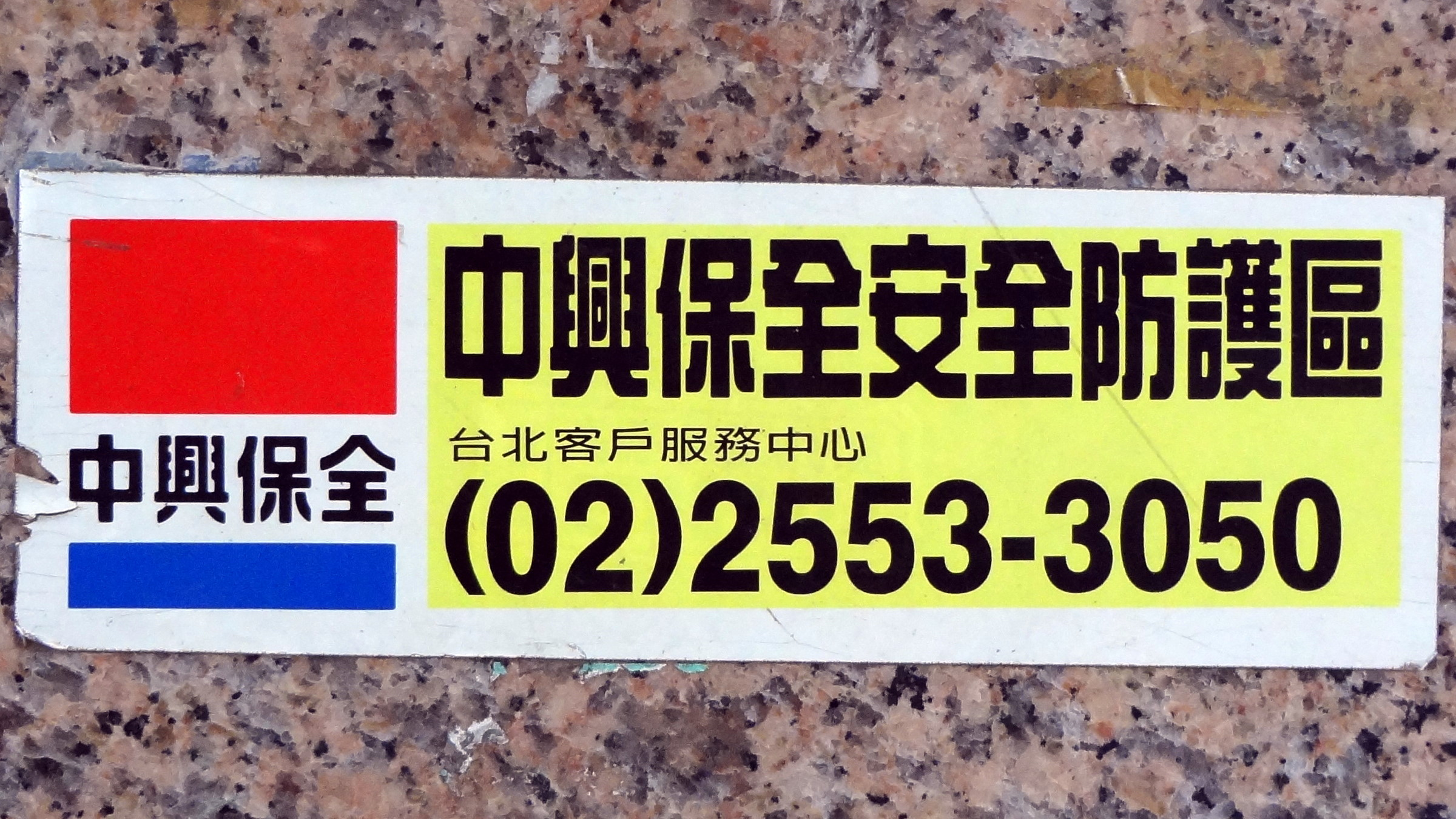 1990年代中興保全安全防護區貼紙，下半部印上中興保全台北客戶服務中心電話號碼。